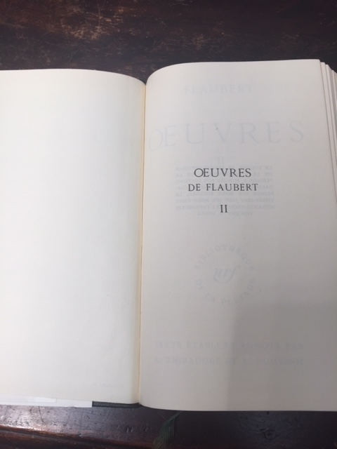 faux-titre d'un de mes livres